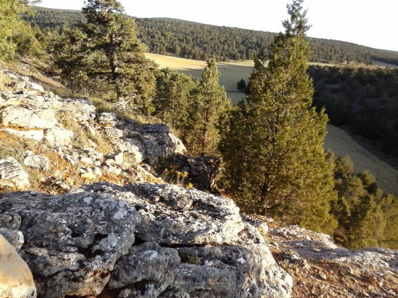 SABINARES DE JUDES